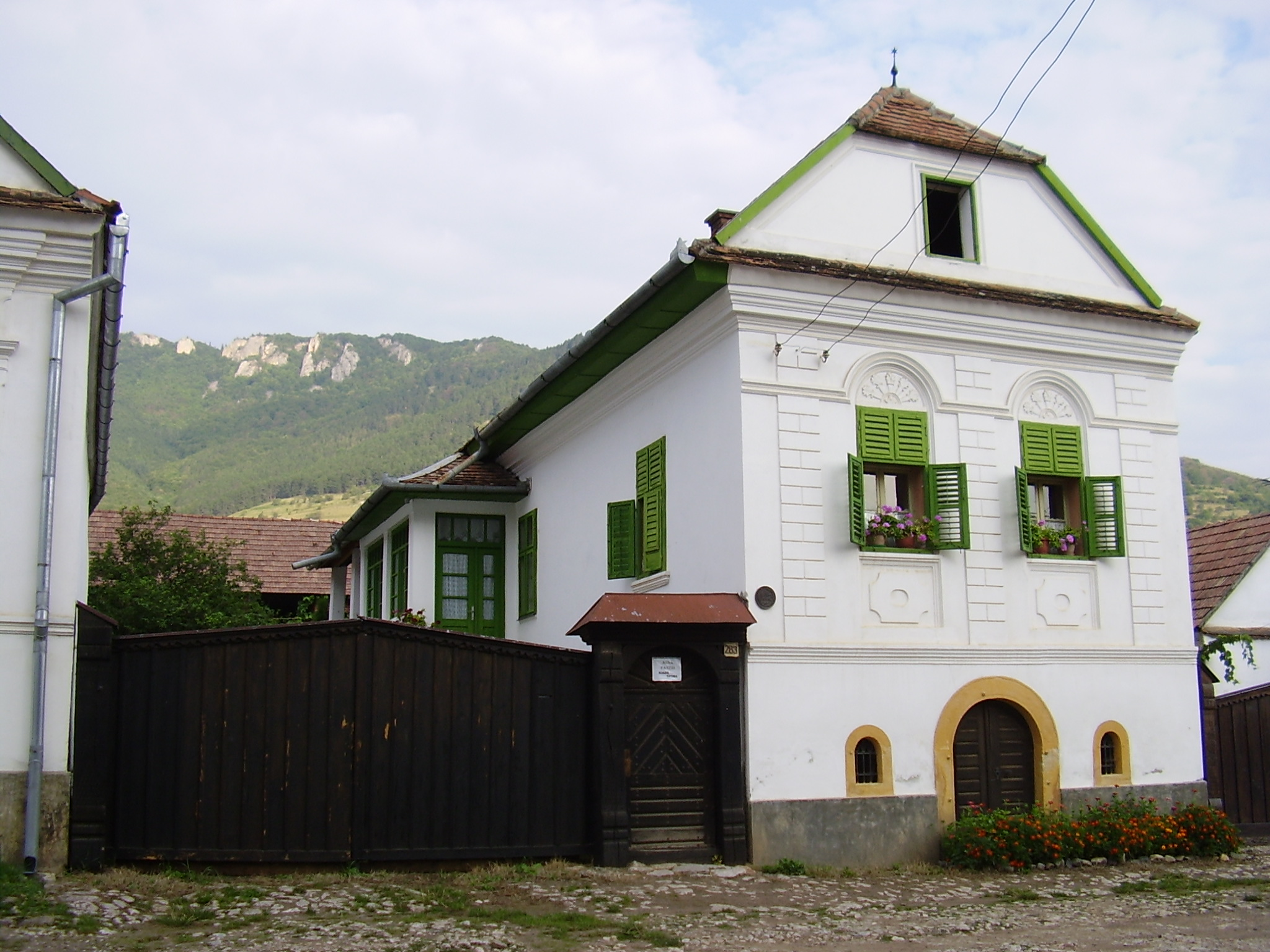 Toroczkói házRomână: Rimetea, casă din centrul istoric.